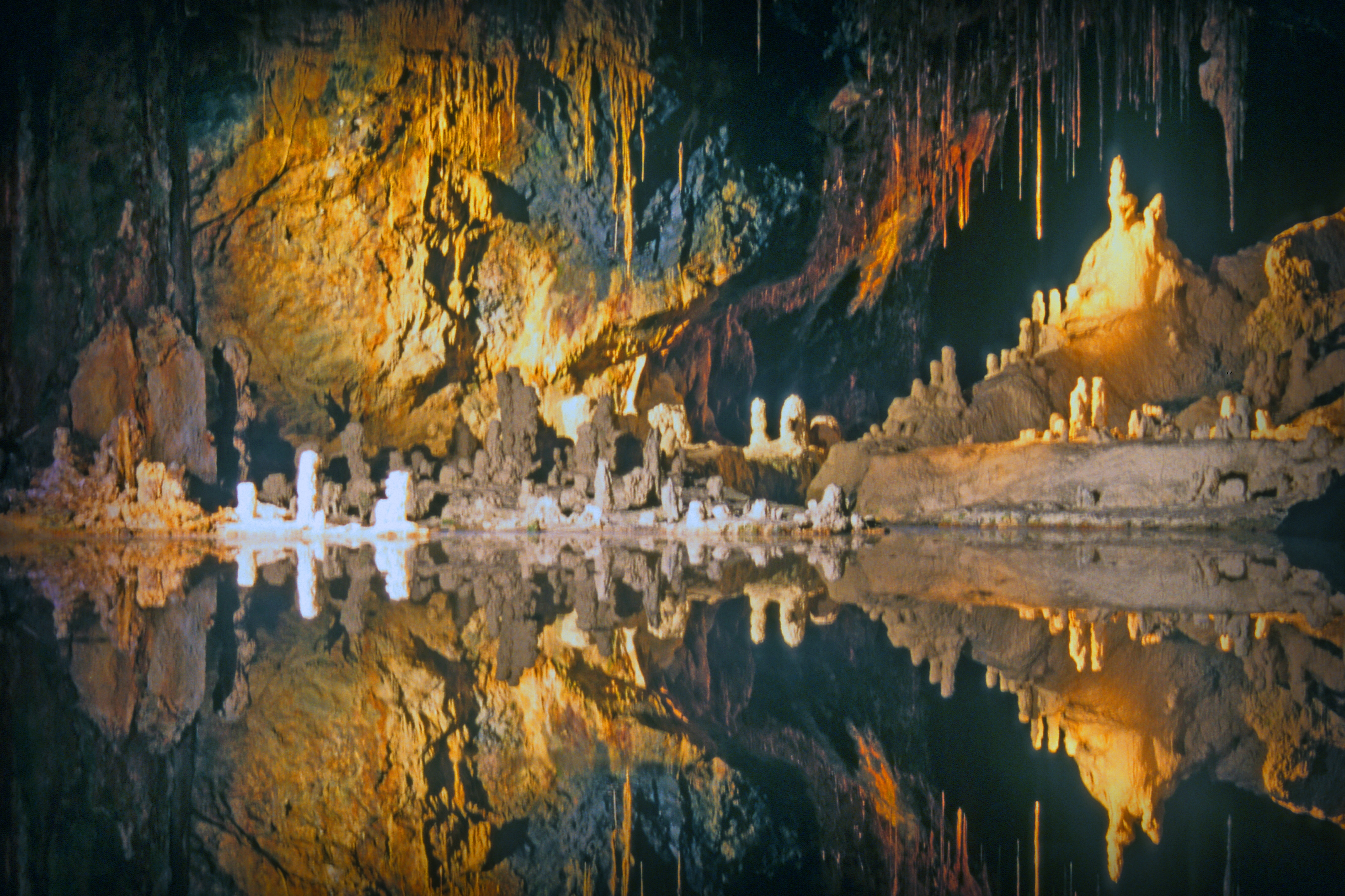 Saalfeld-Garnsdorf: Schaubergwerk Feengrotten; Märchendom mit Spiegelung im unterirdischem See